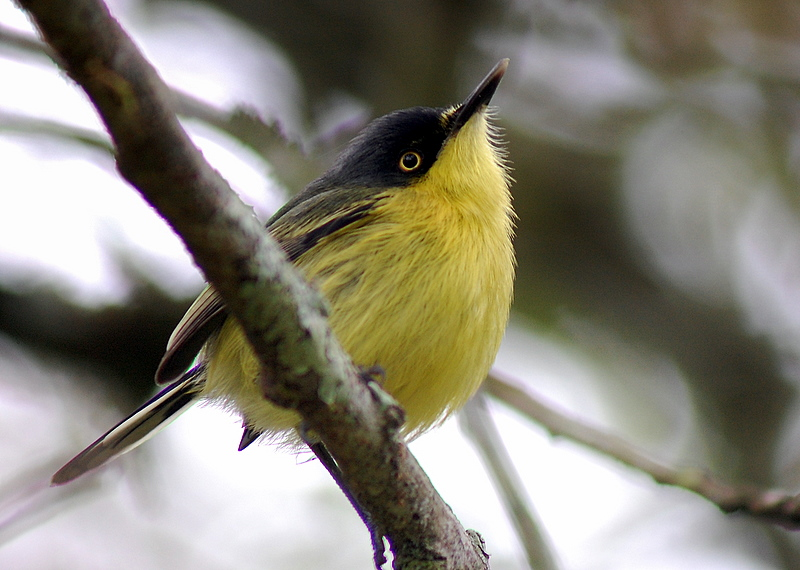 Todirostrum cinereum No jardim da minha sogra em Registro-SP.